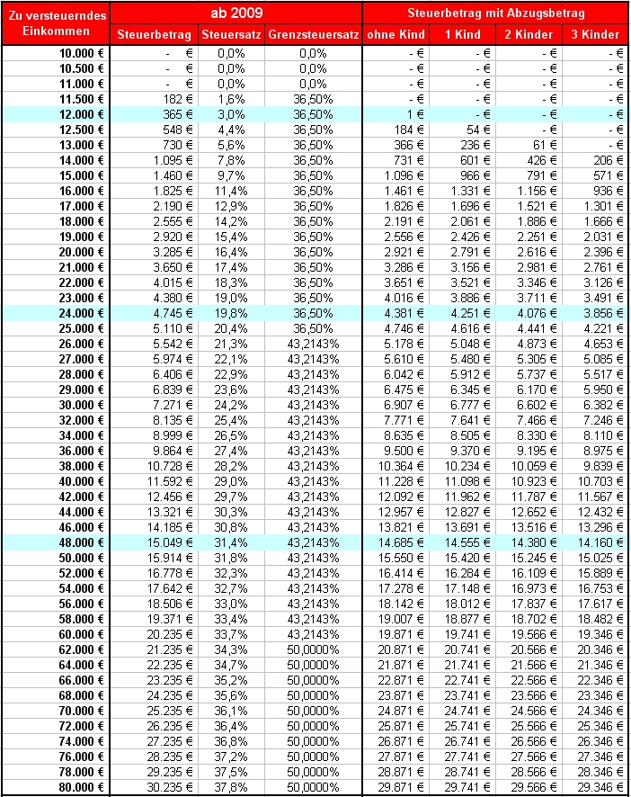 Einkommensteuertabelle Österreich 2009